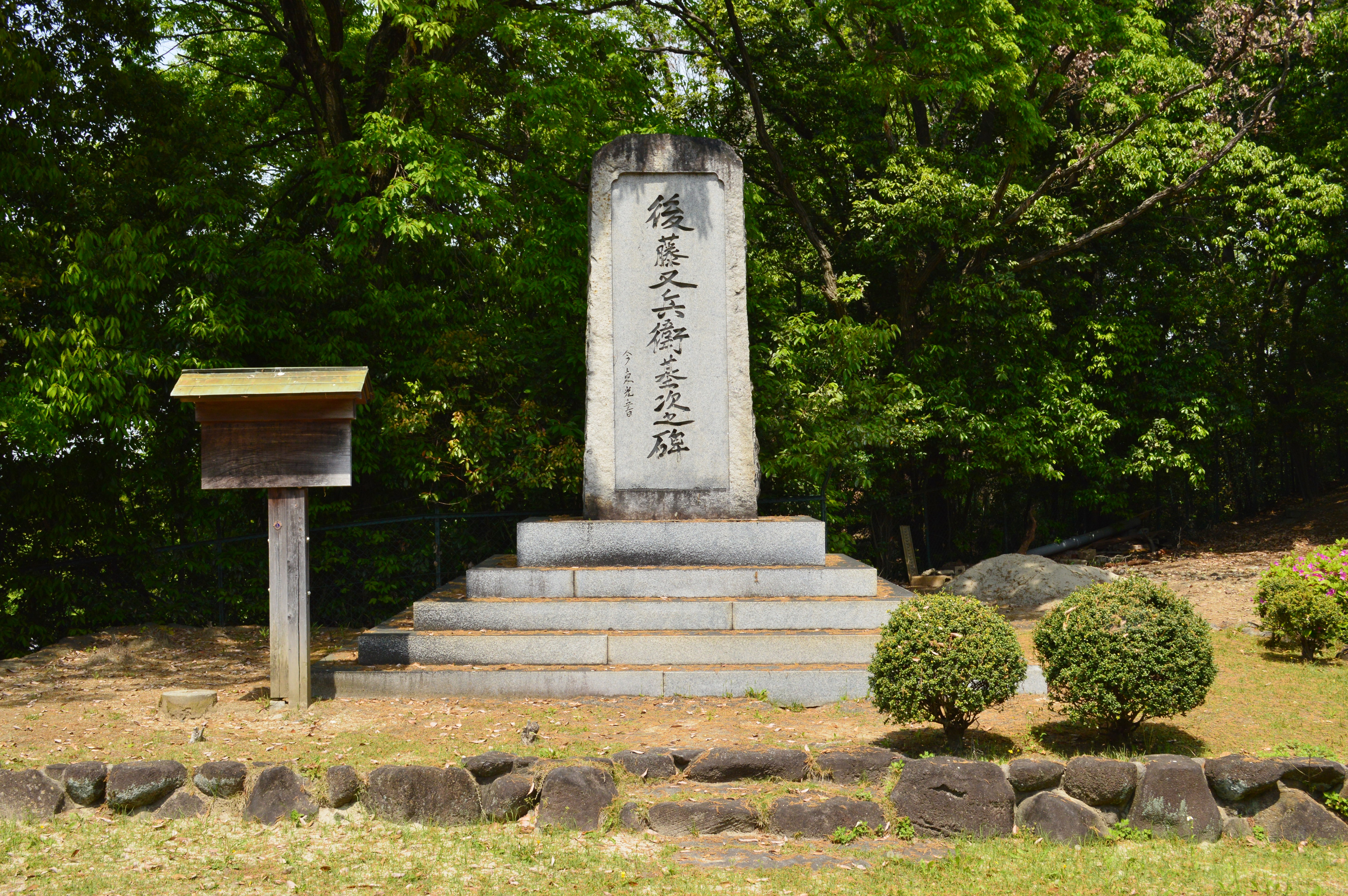 玉手山公園の後藤又兵衛基次之碑